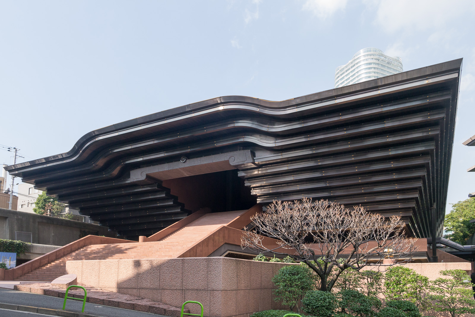 霊友会釈迦殿、東京都港区麻布台1-7-8。